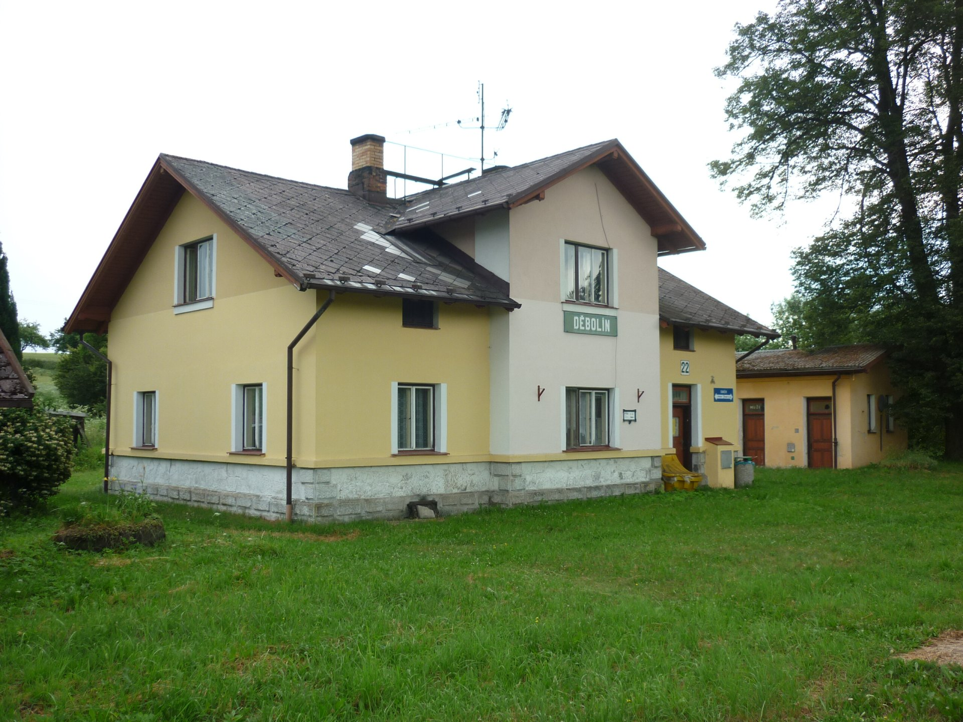 Děbolín, železniční zastávka